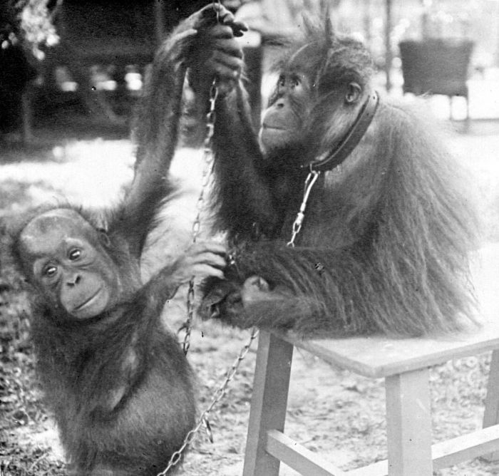 Negatief. De Indische Archipel herbergde één van de mensapen, de orang oetan. Dit dier kwam (en komt alleen) op Borneo en Sumatra voor. Letterlijk betekent orang (h)utan bosmens, wat overigens niet een lokale naam voor het dier is. Rond 1935 kwam de aap nog op veel plaatsen op Borneo voor, met name in het dichte oerwoud van de lage streken, zowel in de moerassen als in de droge gebieden. De dichtheid van de dieren echter was gering. Sinds de ordonnantie van 1931 viel de orang oetan onder de totaal beschermde diersoorten. Hij werd door de Dajaks wel bejaagd (met de blaaspijp) om zijn vlees en om de jongen. Die werden clandestien verkocht. Europeanen en Dajaks hielden ze als huisdier. (P. Boomgaard, 2001). De West-Borneo orang-oetans 'Poetat' en de jonge 'Jacob', West-Borneo